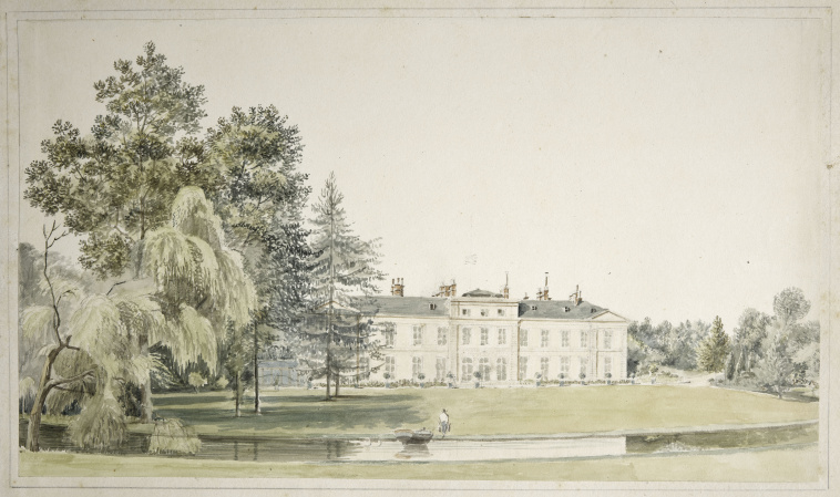 Le château de Saint-Leu vers 1807. Aquarelle de Victor-Louis Nicolle.